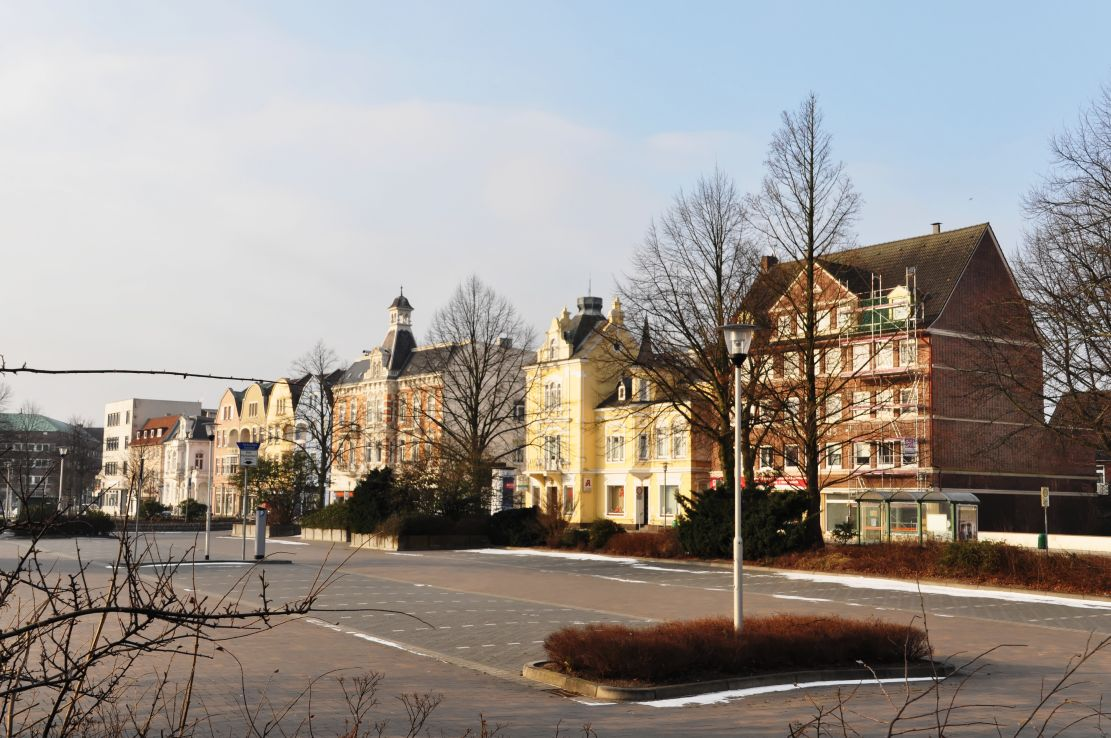 Cuxhaven 2014